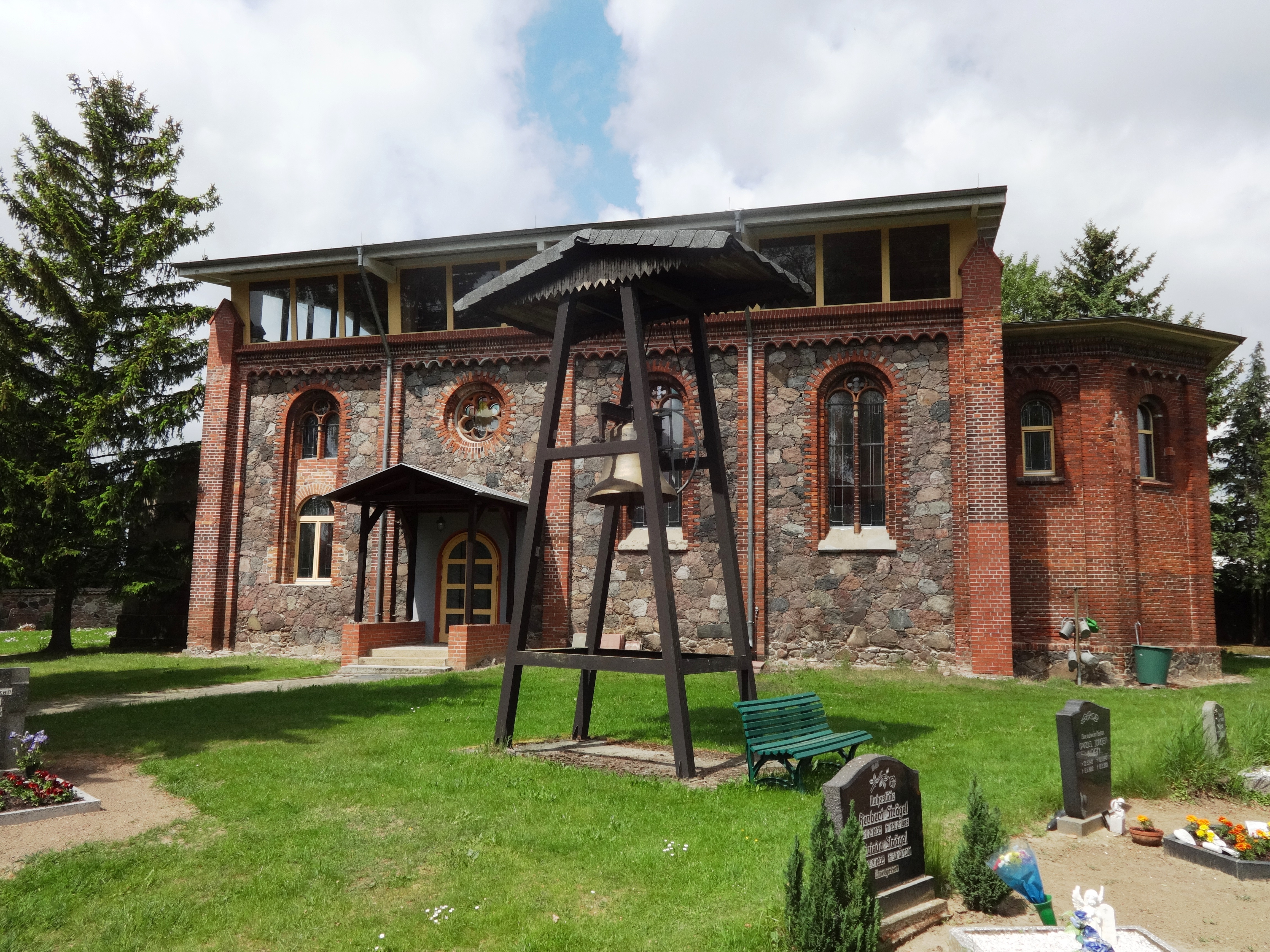 Die neuromanische Saalkirche in Niederjesar entstand 1859 nach Plänen von Friedrich-August Stüler. Im Zweiten Weltkrieg wurde der Turm gesprengt und das Bauwerk verfiel. Nach der Wende wurde die Kirche gesichert, instandgesetzt und umgebaut. Sie dient seit 2002 als kommunales und kirchliches Zentrum.